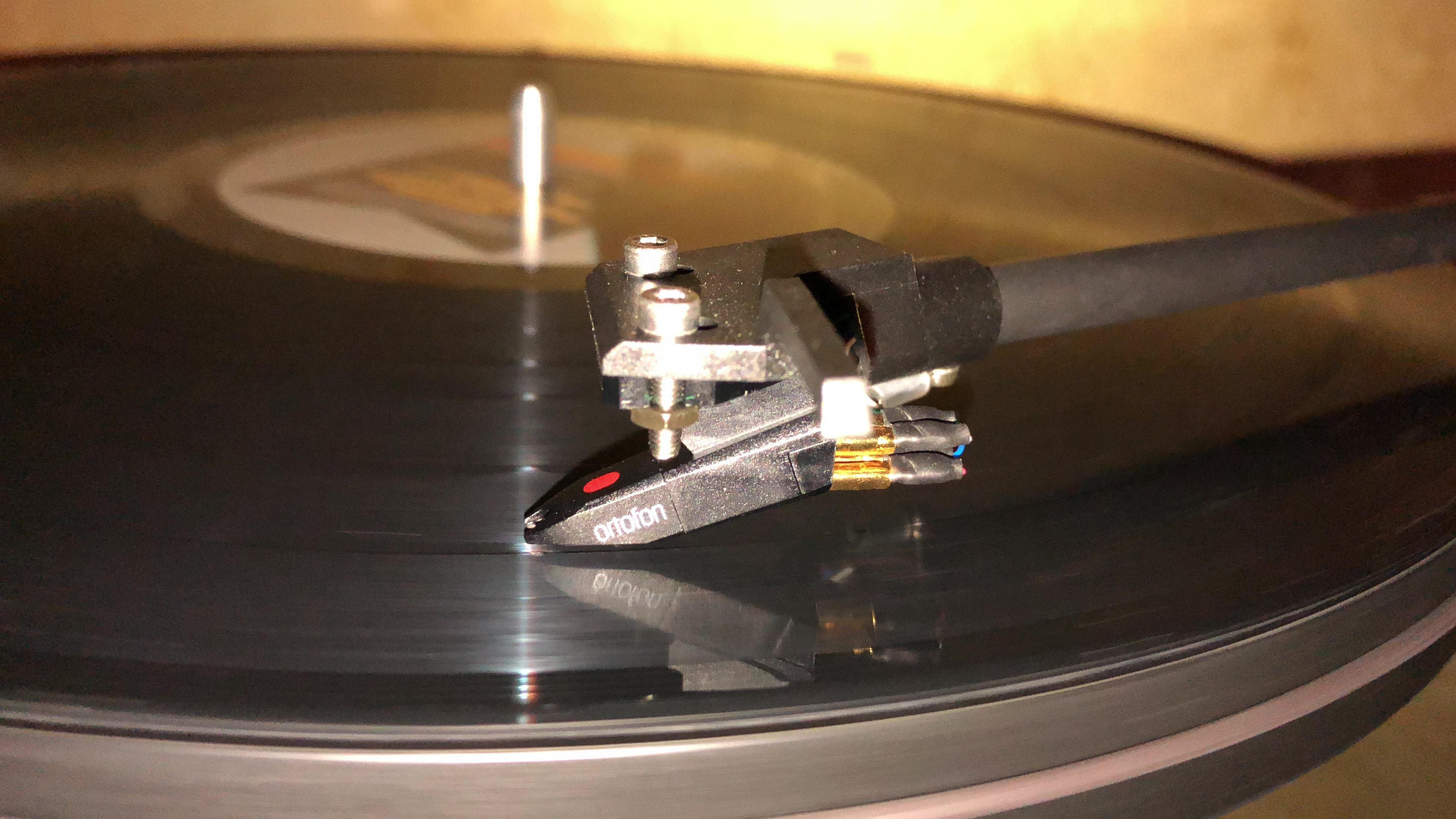 Testina di lettura Ortofon OM 5E